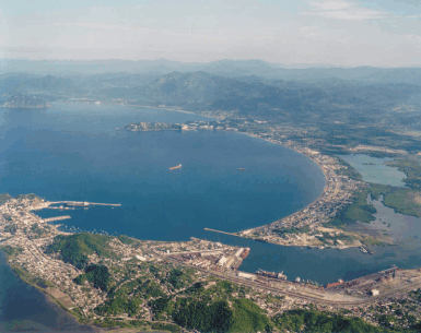 an image from manzanillo